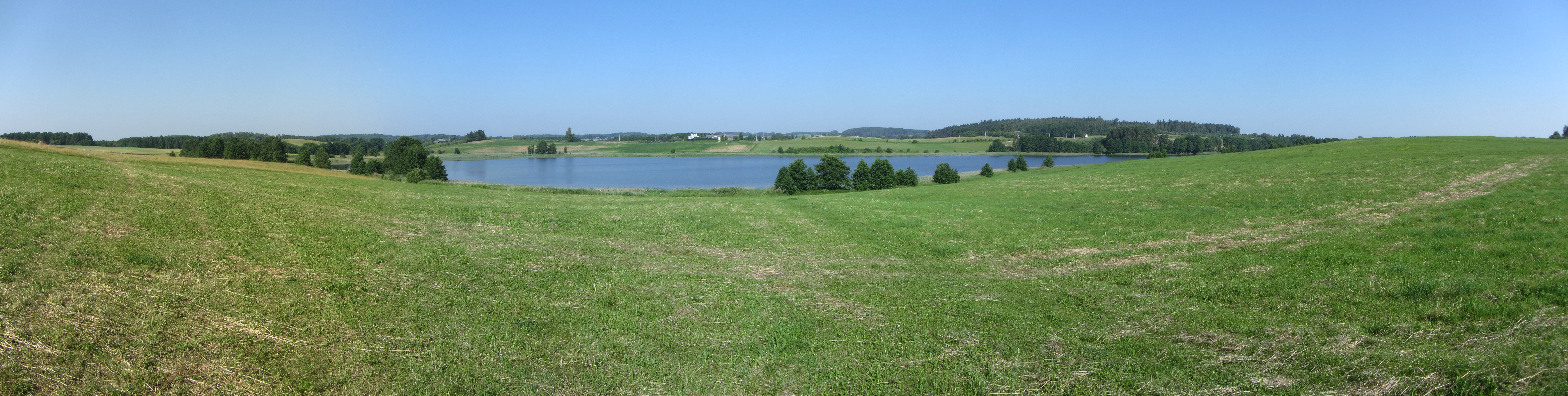 Bagdononys, Lithuania